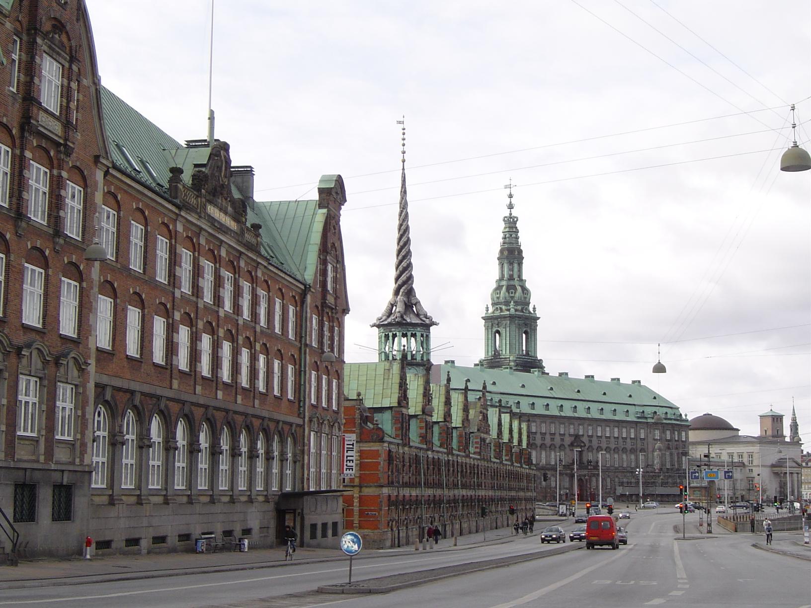 Danemark-Copenhague